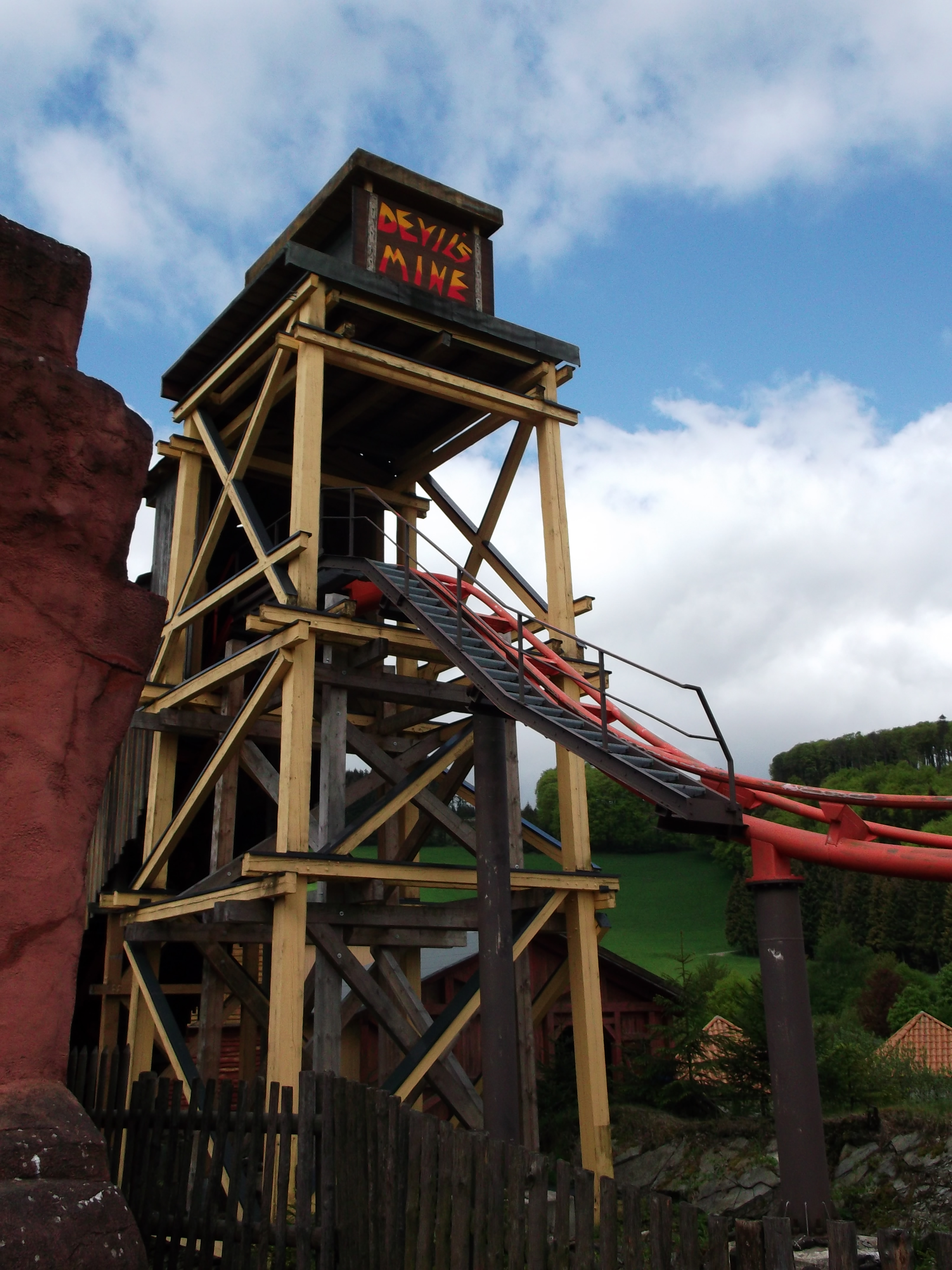 Erste Abfahrt ("First Drop") der Achterbahn "Devil's Mine" im Freizeitpark Fort Fun Abenteuerland